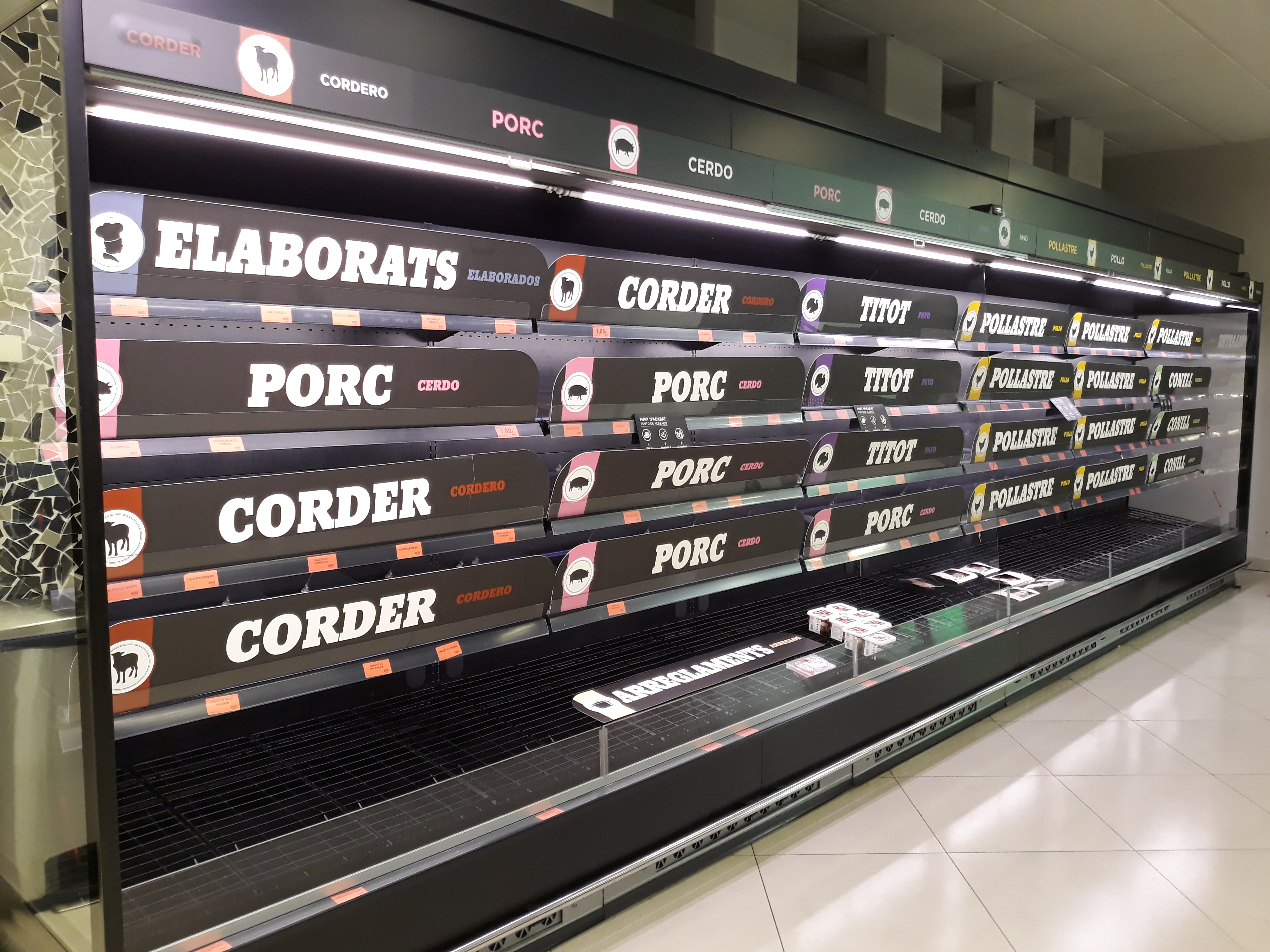 2020-03-14 Desabastiment a Mercadona Museros per compra compulsiva pel COVID-19